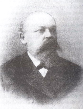 Josef Emler (1836-1899), český historik a archivář.